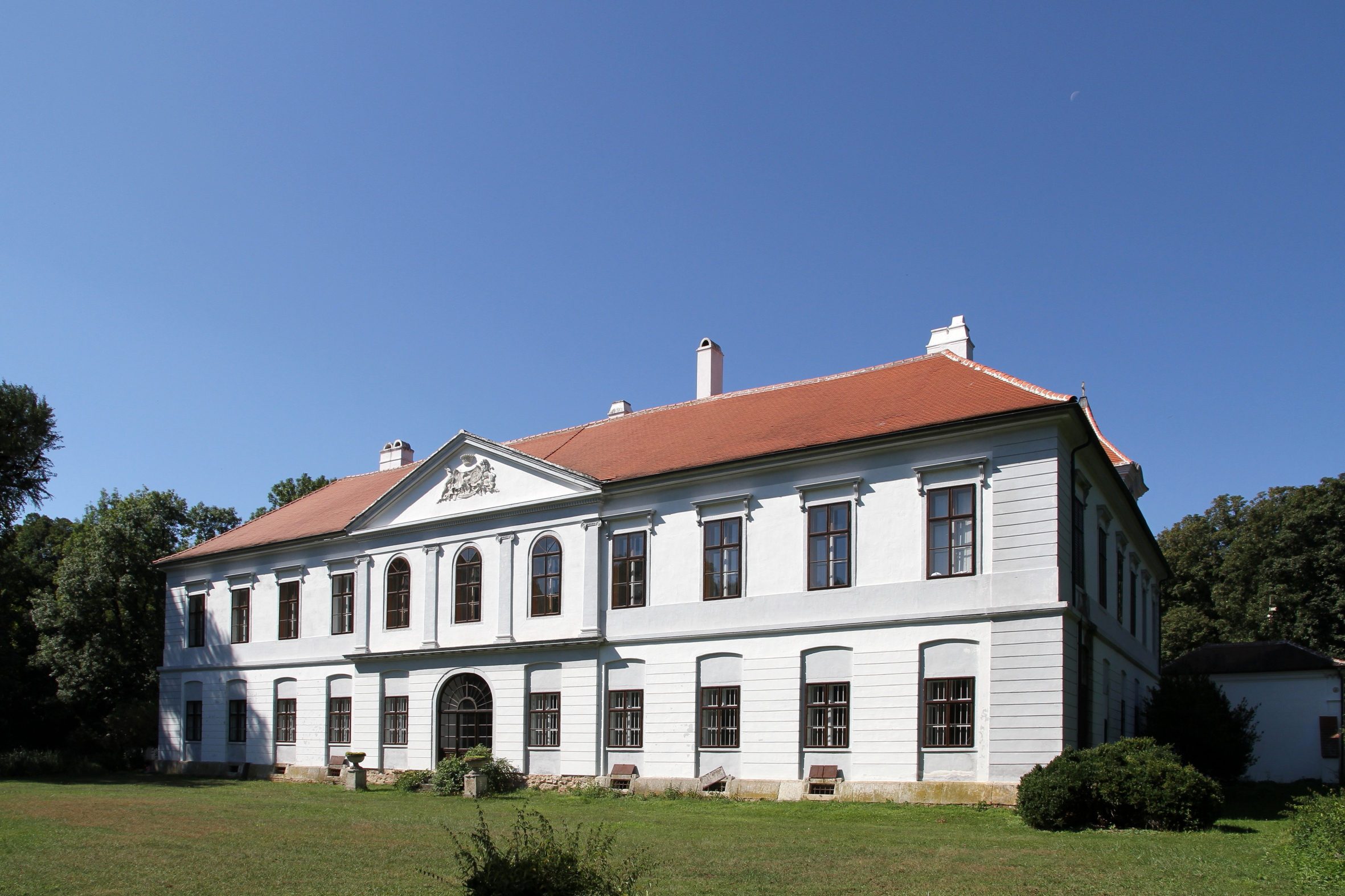 Gartenfassade (um 1840) des Schlosses in der burgenländischen Gemeinde Nikitsch. Ein Schloss, dessen Baugeschichte bis 1300 zurückgeht.